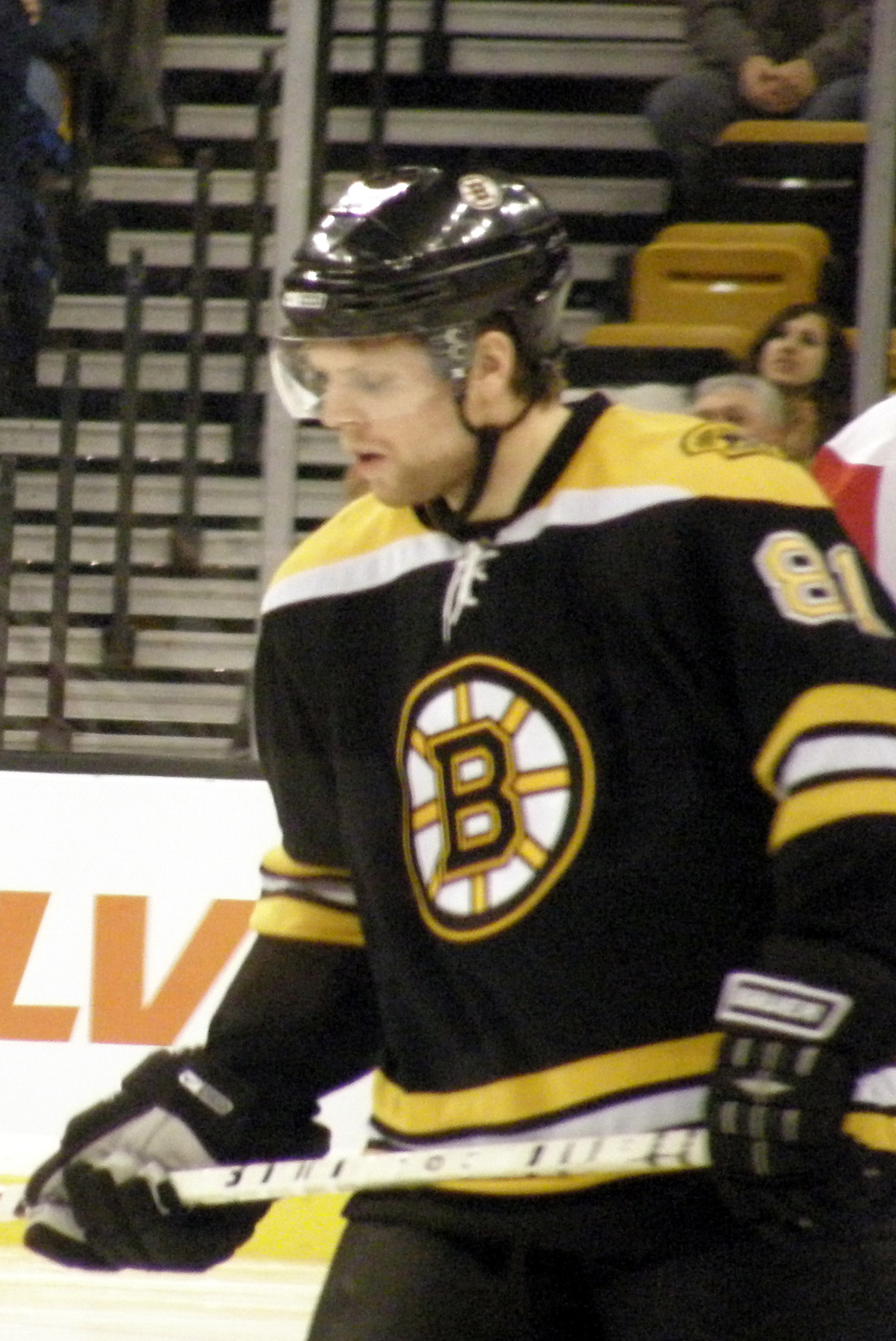 #81 Phil Kessel (RW)